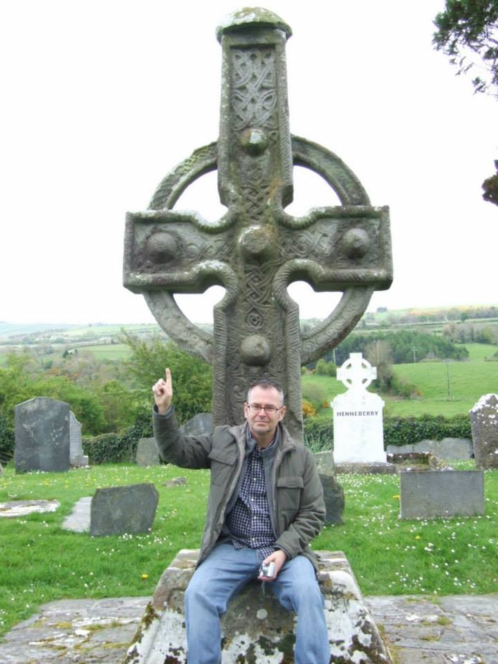 Andrzej Dziewit pod krzyżem celtyckim